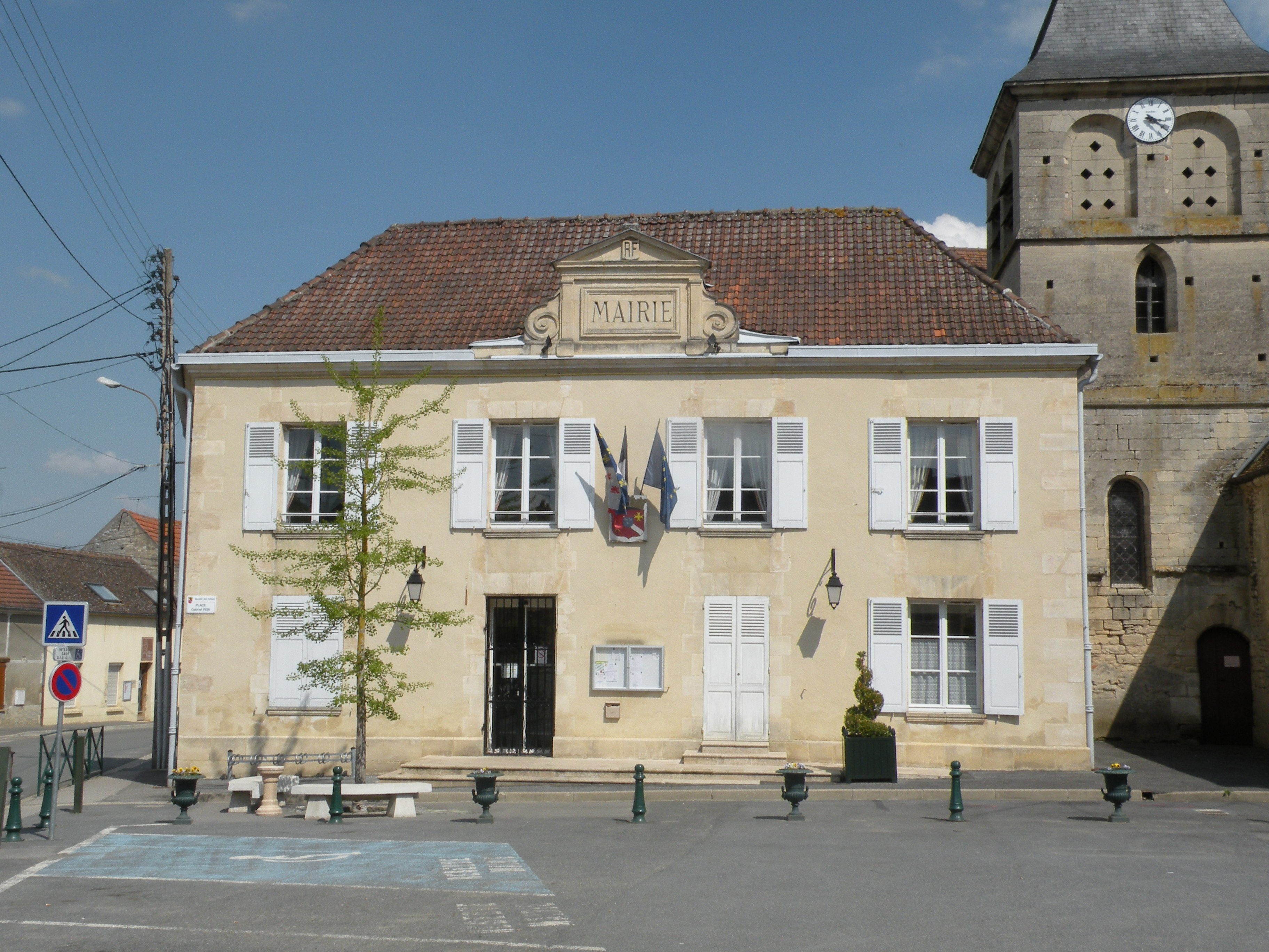 mairie de la commune de Balagny-sur-Thérain, Oise, France